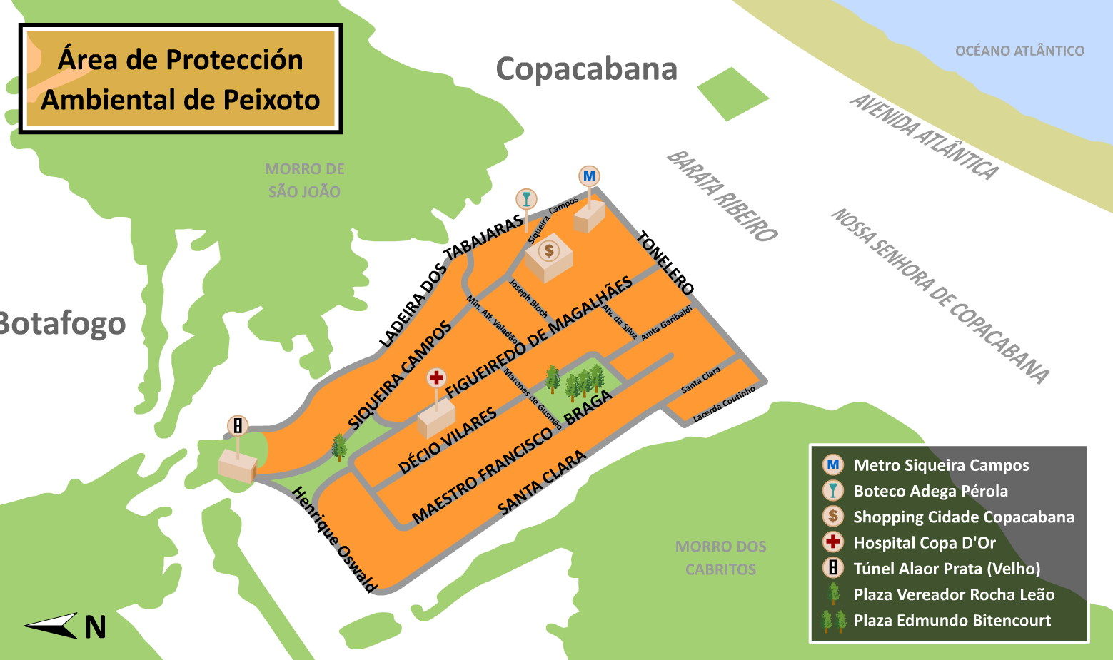 Area de Protección Ambiental (APA) de Peixoto, también conocida como barrio Peixoto, dentro de los límites de Copacabana, Rio de Janeiro, Brasil